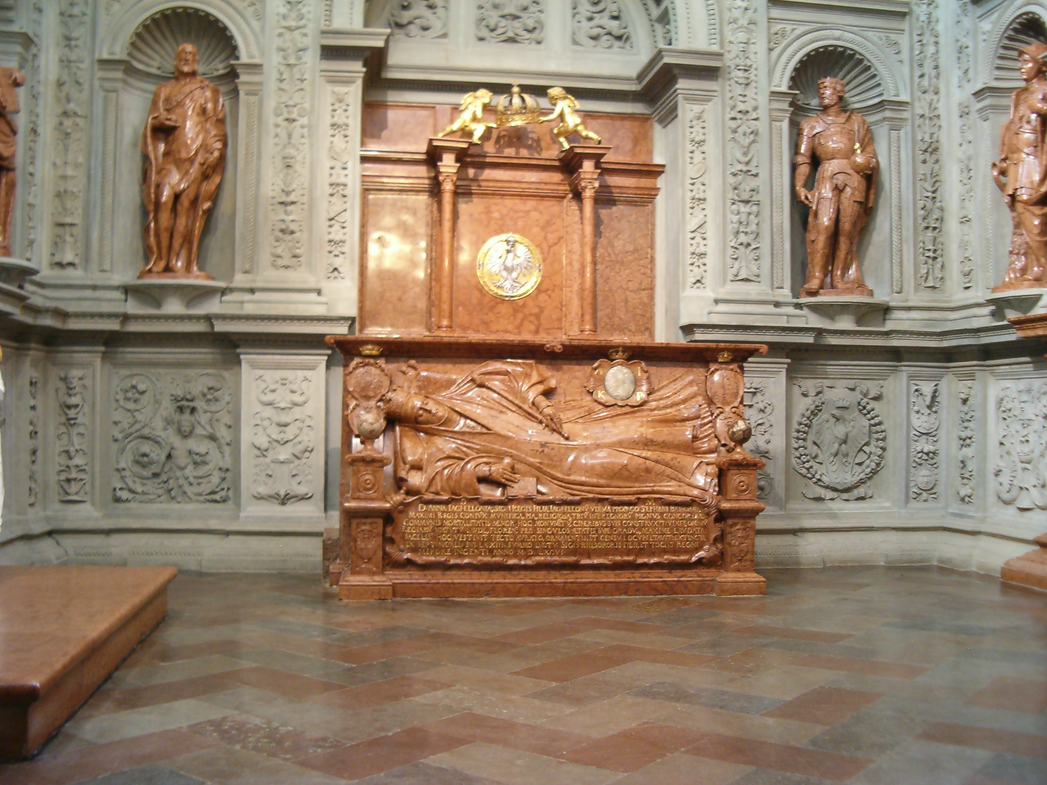 Nagrobek Anny Jagiellonki w Kaplicy Zygmuntowskiej Królewskiej Katedry na Wawelu